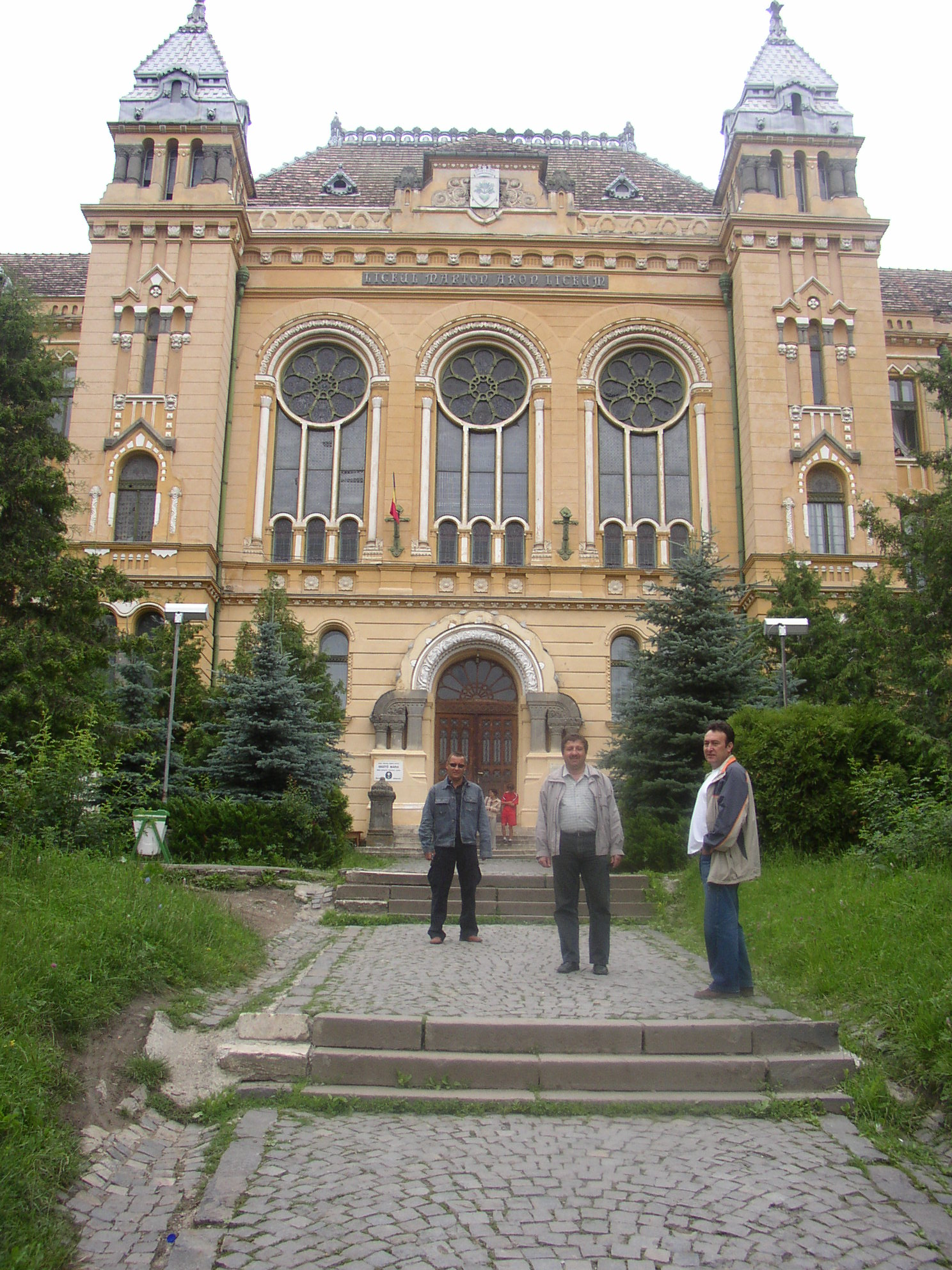 Miercurea Ciuc, Gimnasium